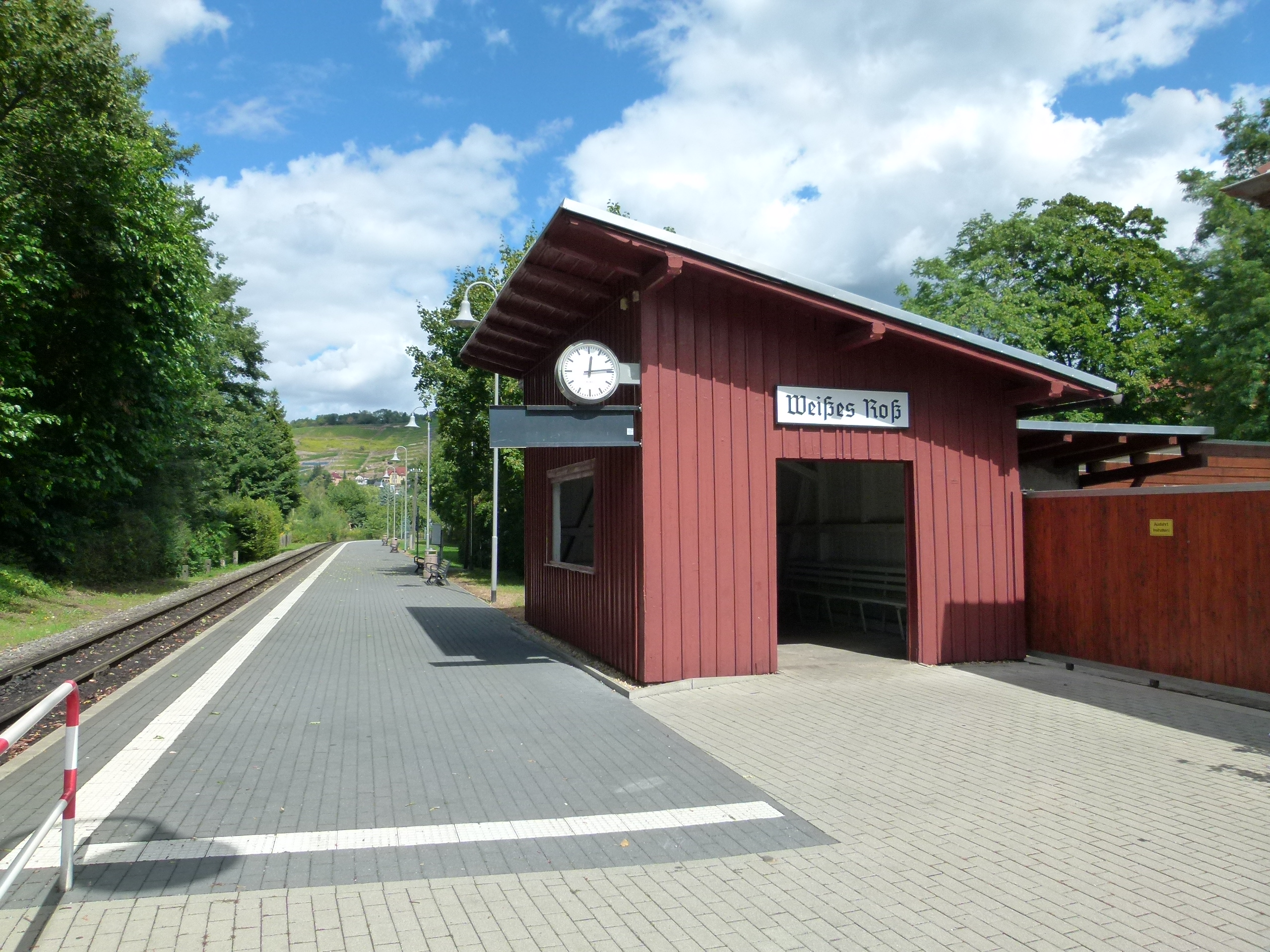 Lößnitzgrundbahn, Kleinbahnstation Augustusweg 2 Radebeul, Sachsen